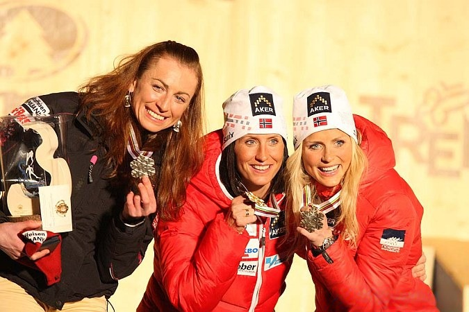 Dekoracja medalowa biegu indywidualnego kobiet na 30 km techniką klasyczną